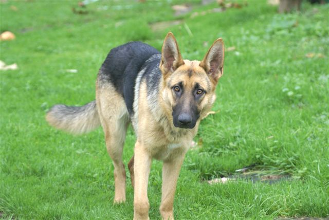 Deutscher Schäferhund